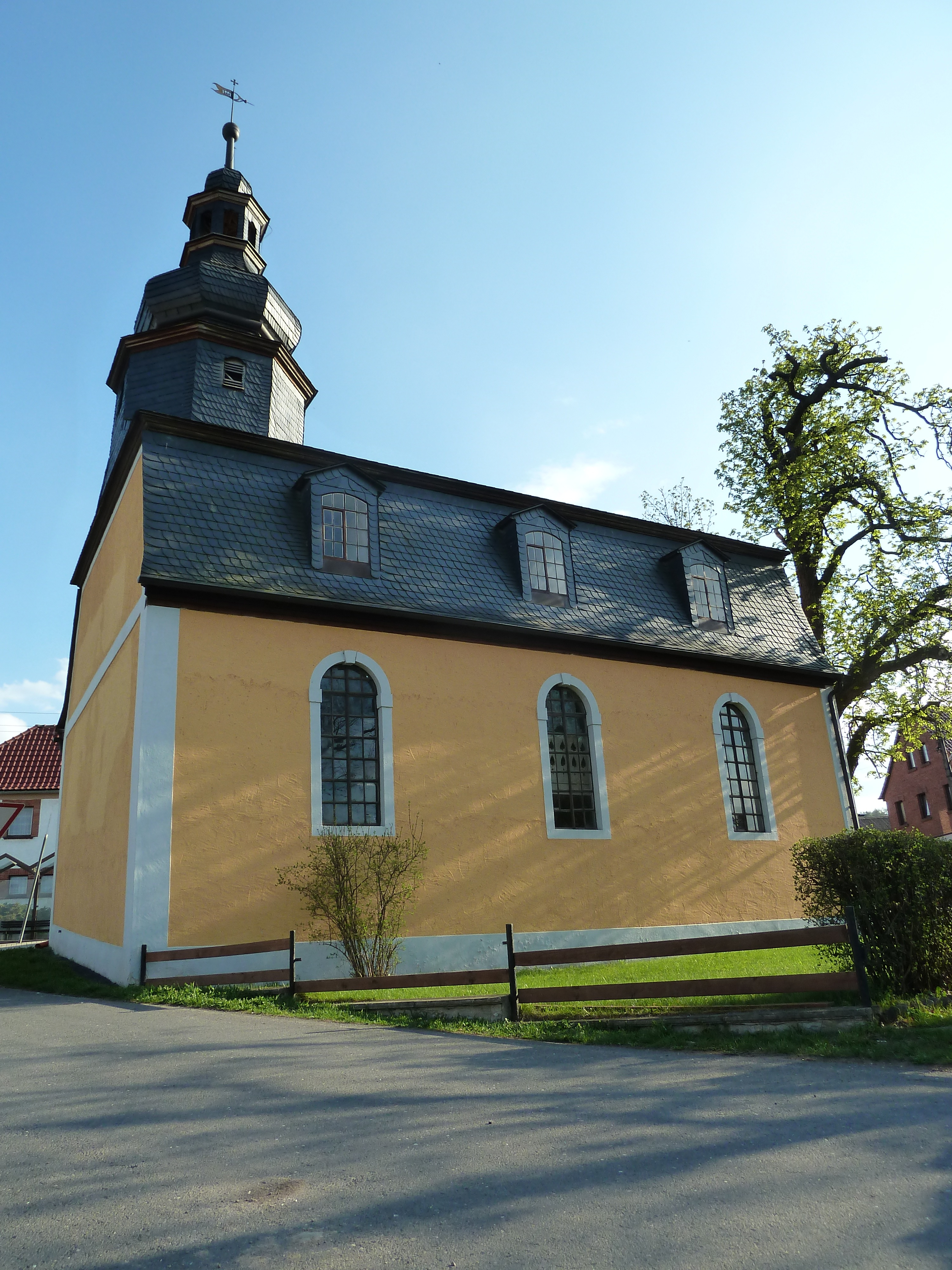 Dorfkirche in Dobian